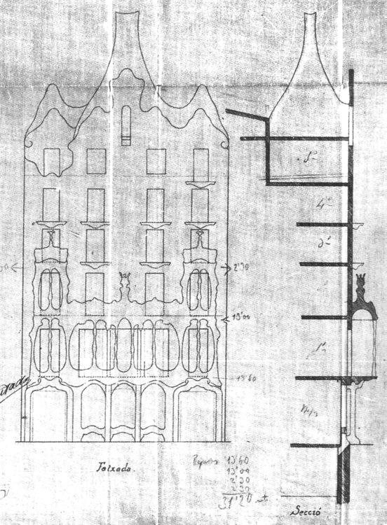 Fachada y sección de la Casa Batlló, de Antoni Gaudí (1904).